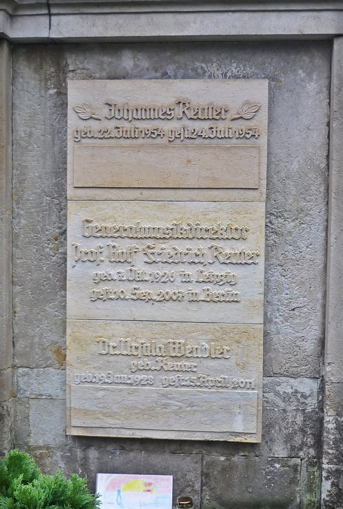 Grabmal des GMD Prof. Rolf Reuter auf dem Inneren Plauenschen Friedhof in Dresden-Plauen